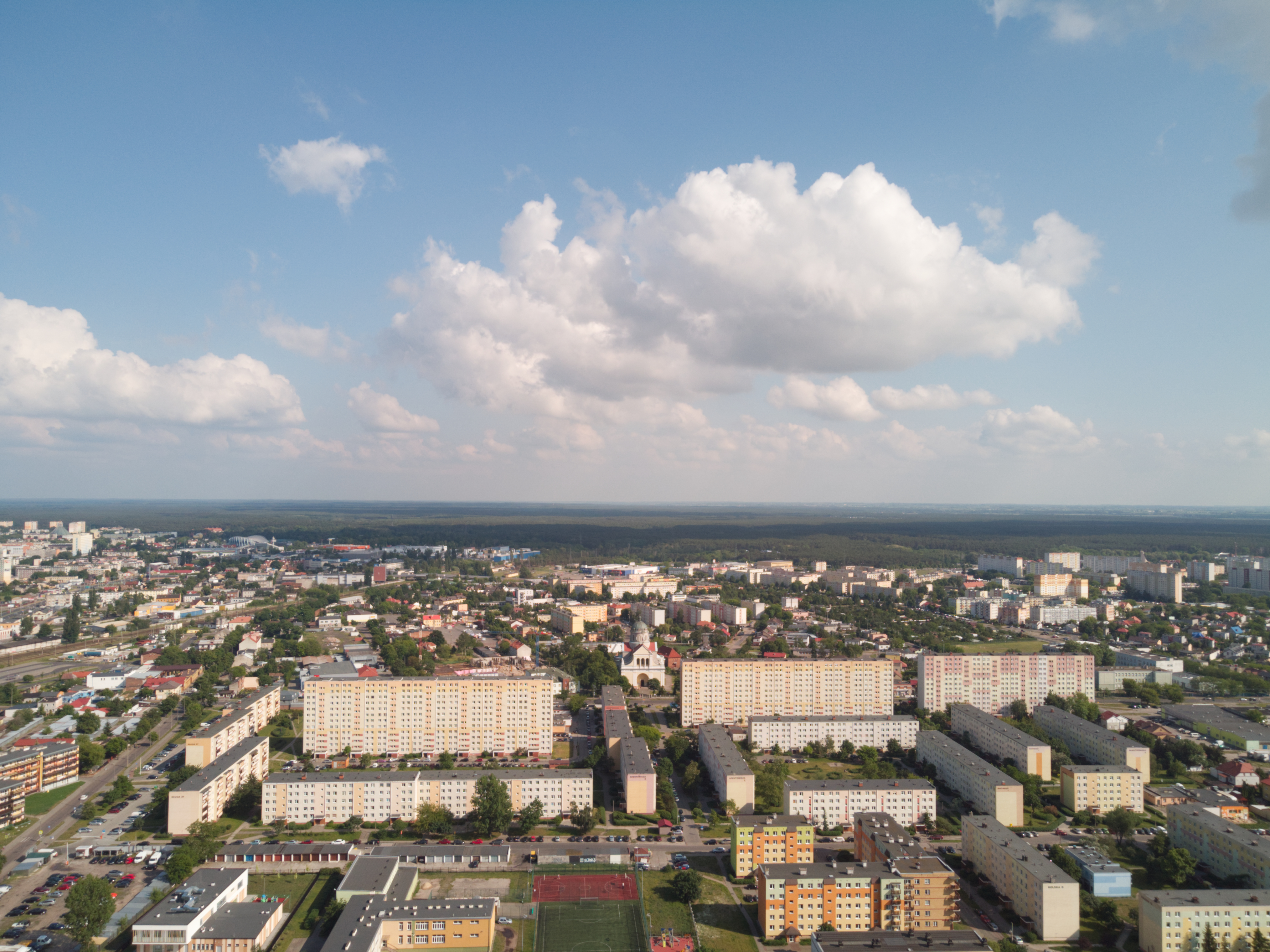 Południe (2020 r.)